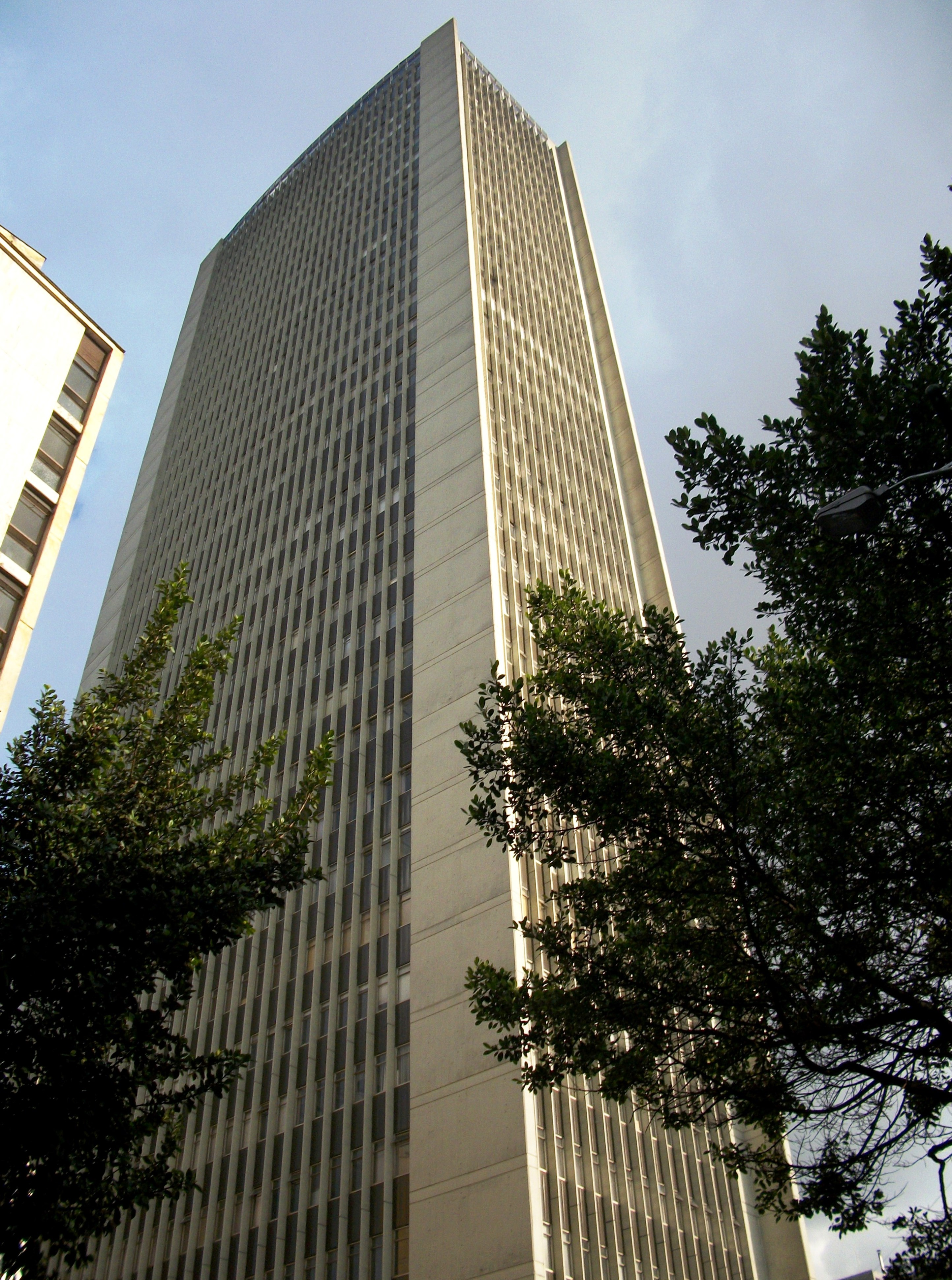 Costado noroccidental del edificio Avianca, desde la cra 7. Bogotá.